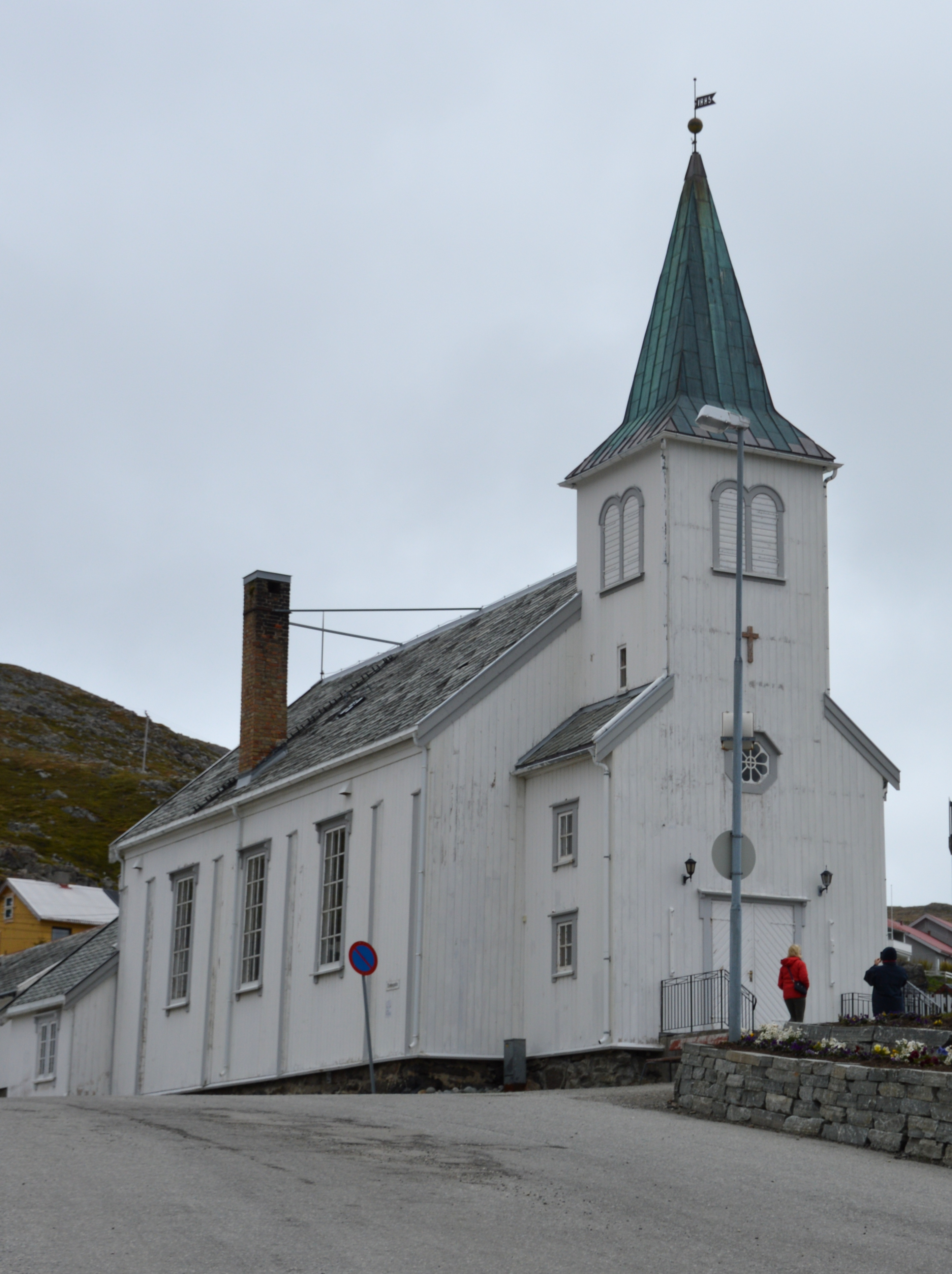 Kirche von Honningsvag